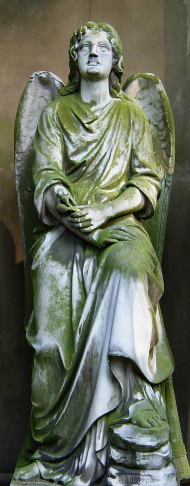 Grabengel (1865) von Bernhard Afinger für die Begräbnisstätte des Fabrikanten Nis Clason und seiner Frau auf dem Alten Friedhof Bonn; der Engel hält Mohn in seiner Linken, als Symbol des Schlafes und des Todes